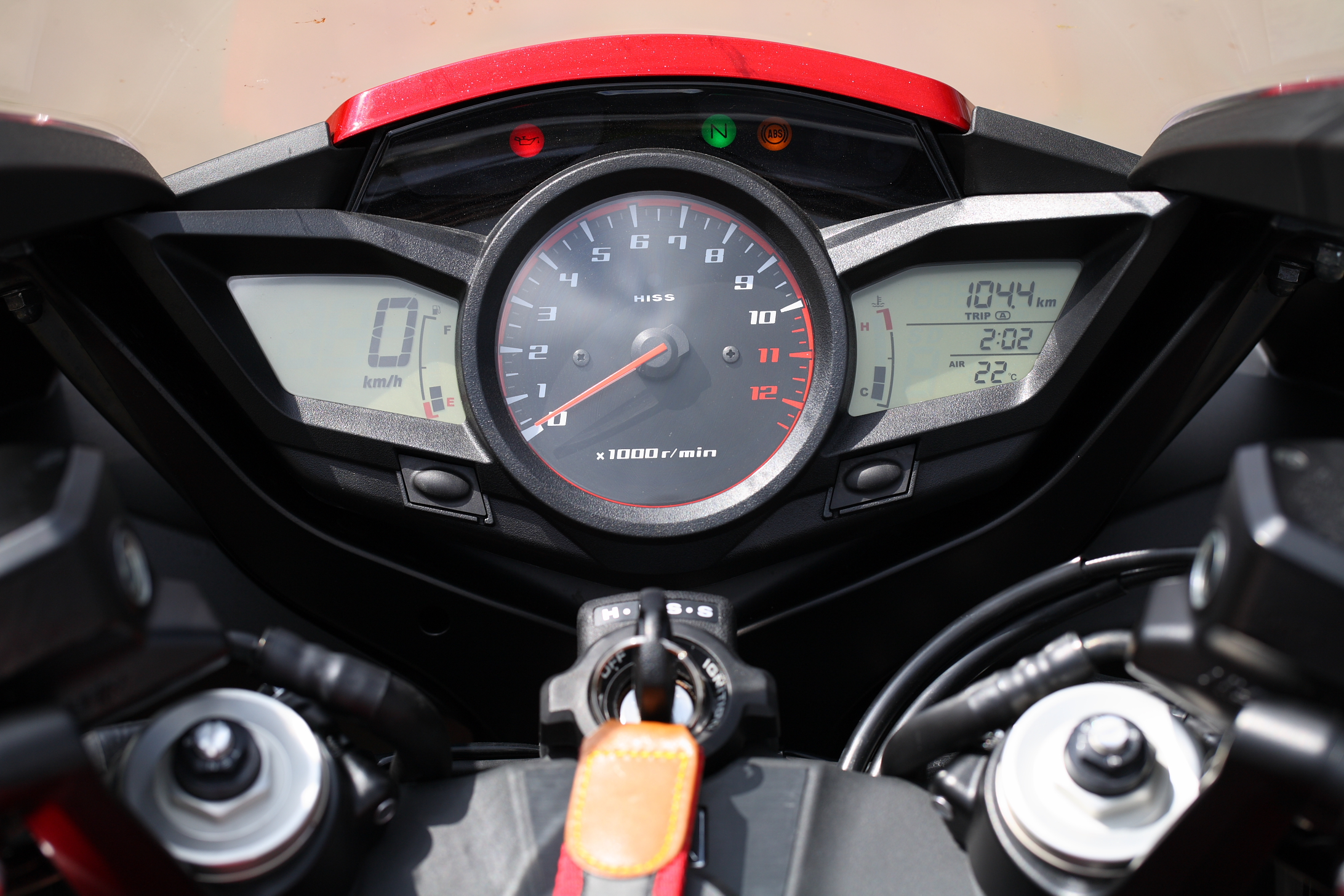 Honda VFR 1200 F, Bj.2010, Farbvariante: Candy Prominence Red